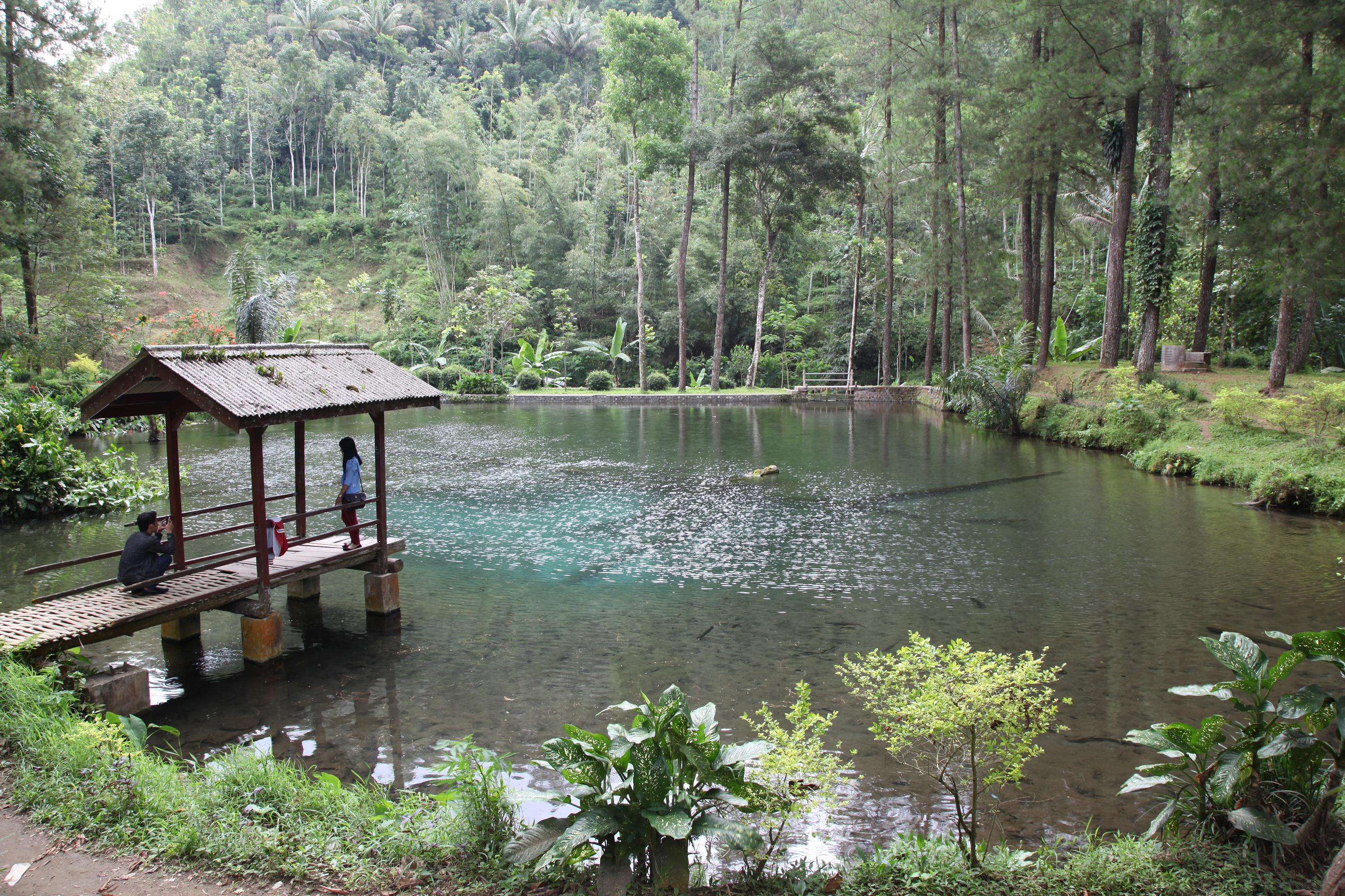 Situs Rambut Monte